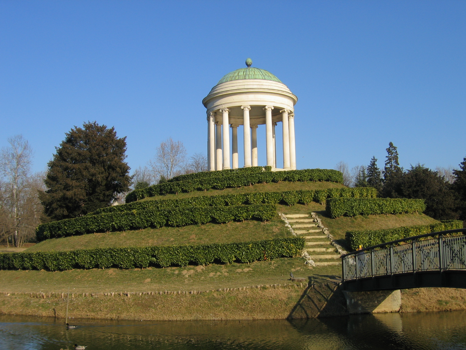 Parco Querini: il tempietto monoptero, Vicenza, Italia.